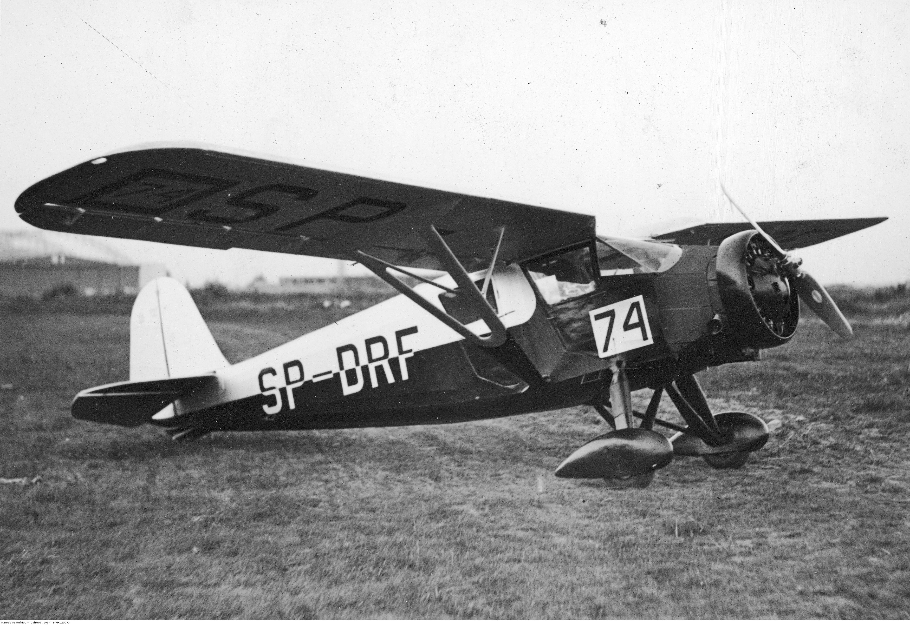 Samolot RWD-9 na Międzynarodowych Zawodach Samolotów Turystycznych (Challenge 1934) w Warszawie. Koncern Ilustrowany Kurier Codzienny - Archiwum Ilustracji. Sygnatura: 1-M-1250-3